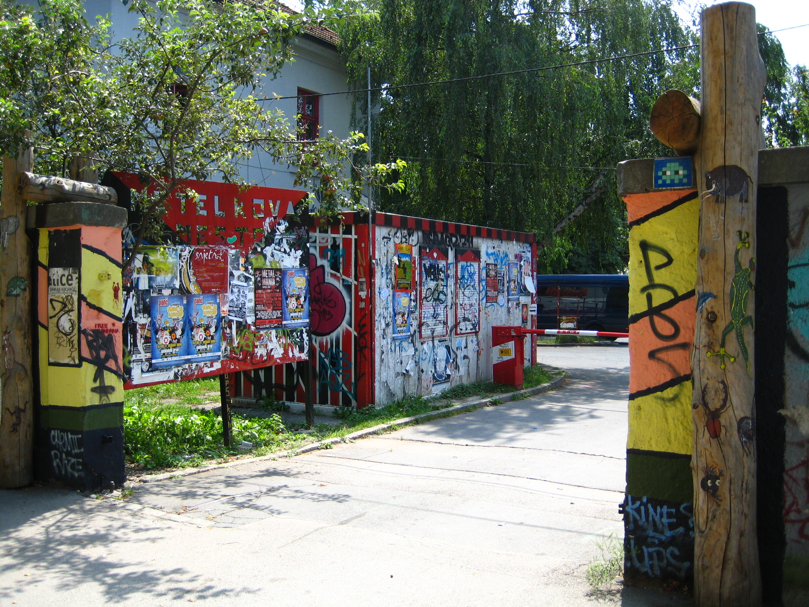 Metelkova mesto/Masarykova cesta (Ljubljana)